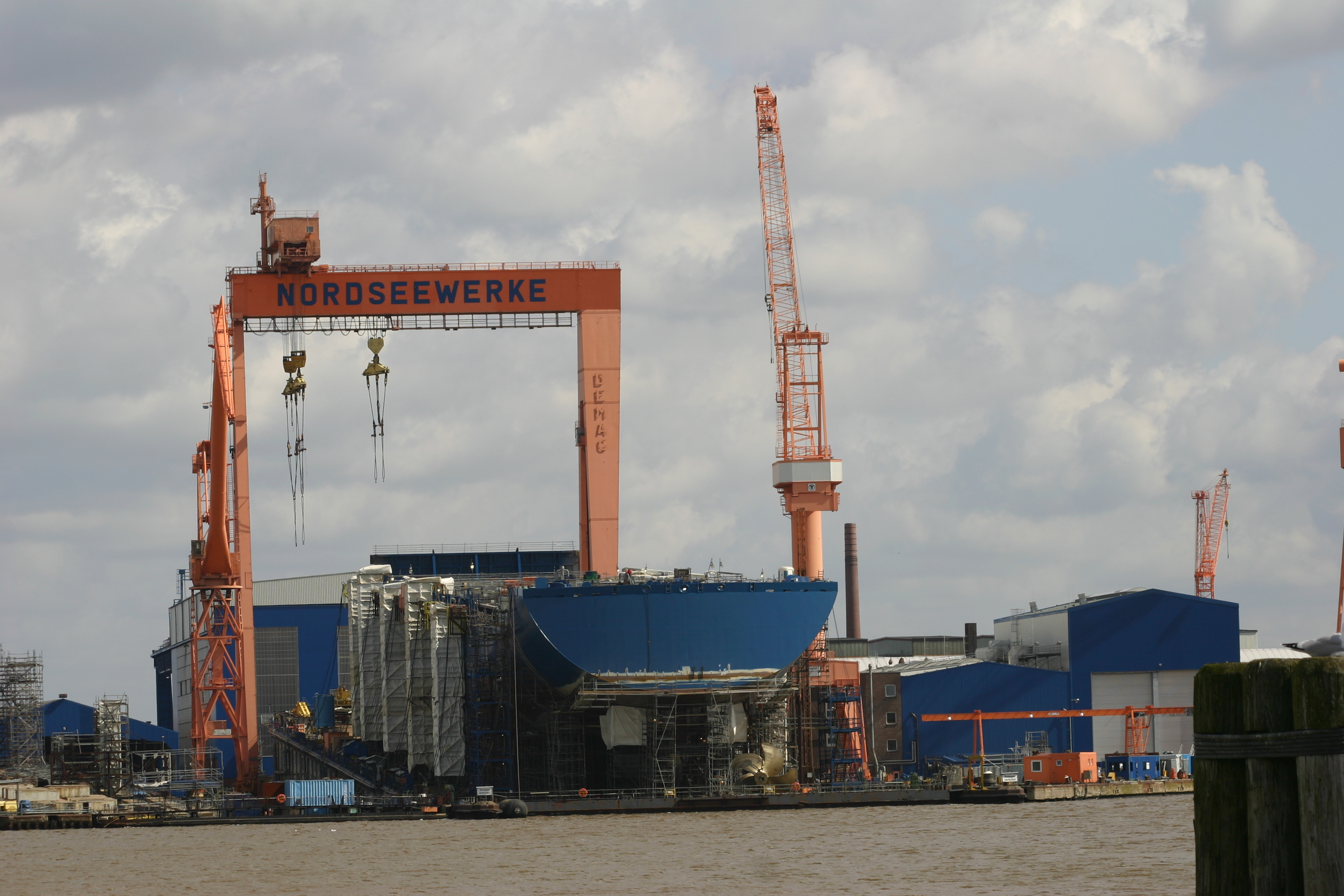 Blick auf die Helling der Nordseewerke in Emden, Ostfriesland, Niedersachsen